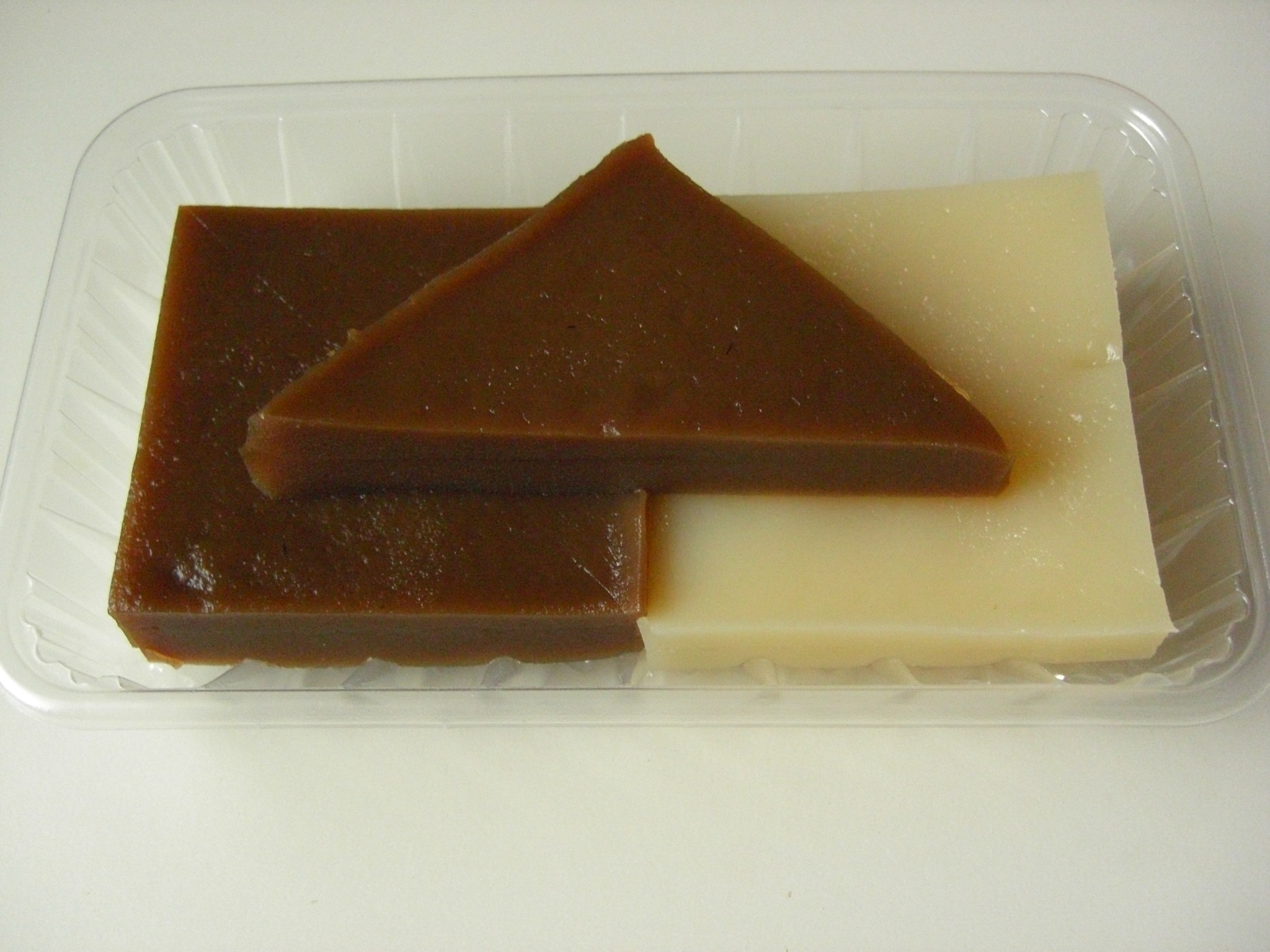 スーパーで売っていたういろう 黒砂糖と白